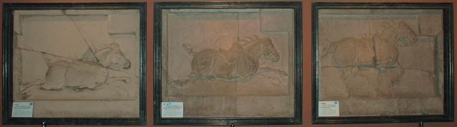 西安碑林中的昭陵六骏－什伐赤-青骓-特勤骠